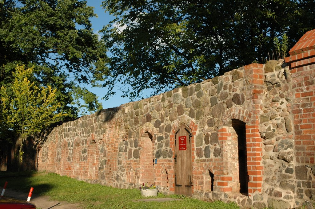 Stadtmauer Angermünde